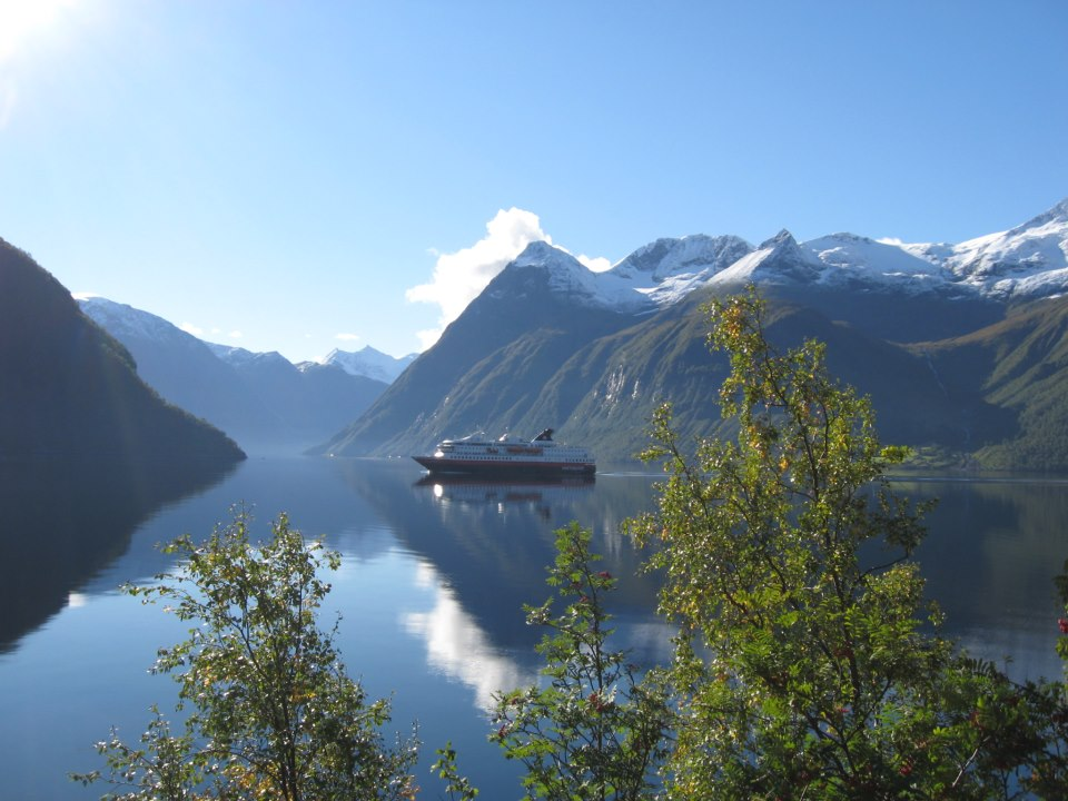 MS Nordnorge anløper Urke sommeren 2012